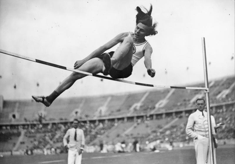 Berlin, Heinrich Ratjen alias "Dora Ratjen" Scherl: Deutsche Leichtathleten kämpfen um die Meistertitel. Am Sonnabend und Sonntag wurden im Olympia-Stadion zu Berlin die Deutschen Leichtathletik-Meisterschaften ausgetragen. Mit 1,63 m, nur 2 cm unter der Welthöchstleistung, siegte beim Hochsprung der Frauen Fräulein [Dora] Ratjen (Bremen). 25.7.1937 [Berlin, Olympiastadion.- "Dora Ratjen", eigentlich Heinrich Ratjen beim Hochsprung, Juli 1937] Abgebildete Personen: Ratjen, Heinrich: 1918-2008; Leichtathlet (unter der Namen Dora Ratjen), Deutschland